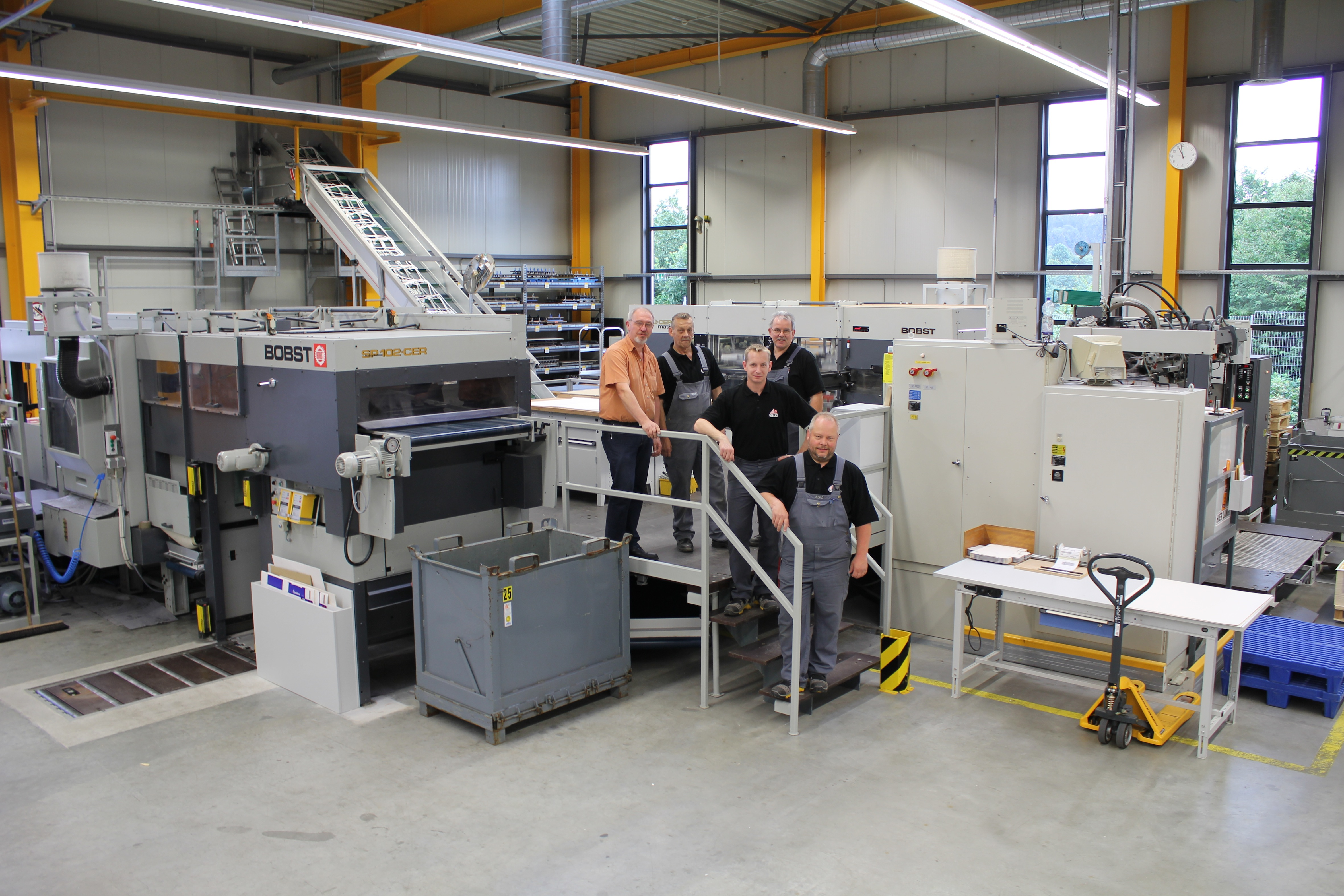 Stanzmaschine